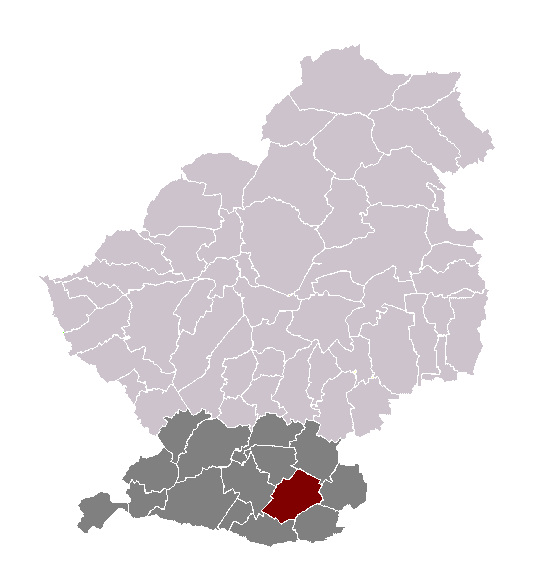 Fressain dans son canton et son arrondissement